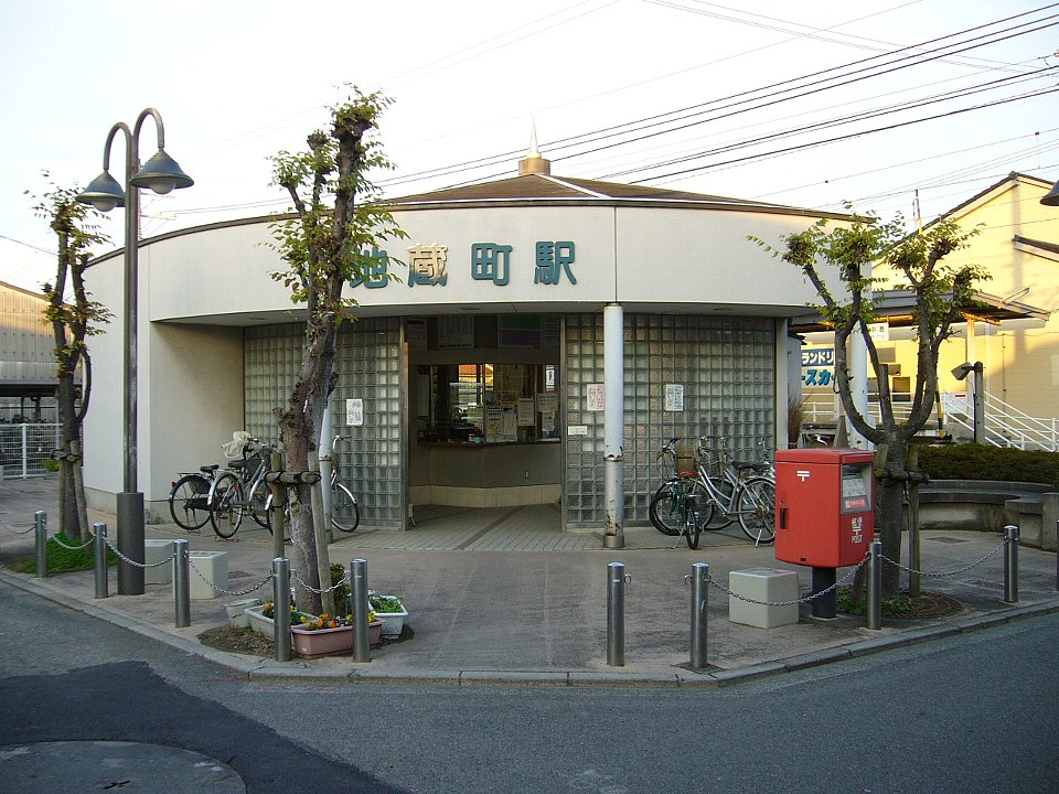 伊予鉄道地蔵町駅 駅舎